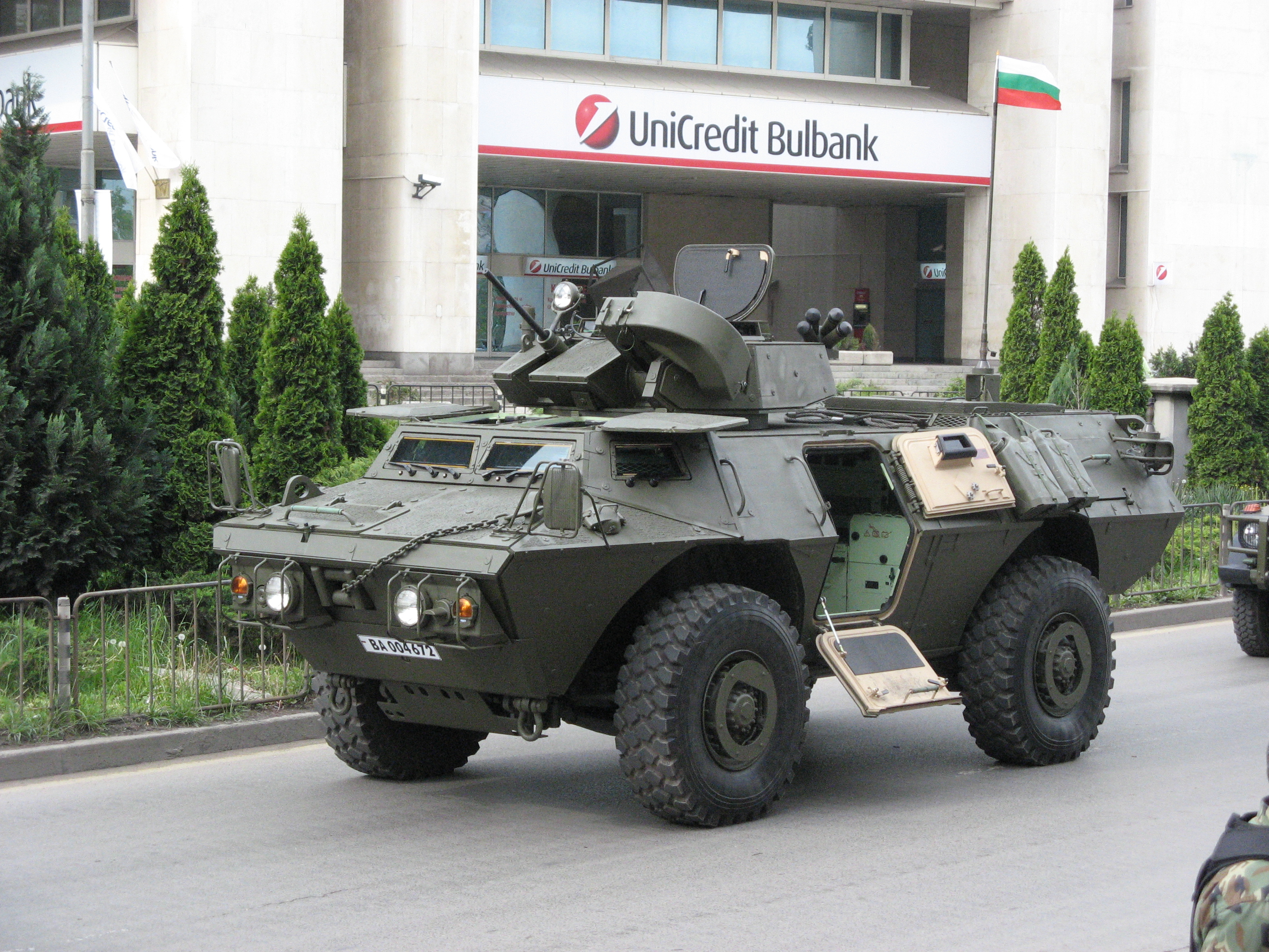 Българска бойна бронирана машина М1117 по време на Гергьовденският парад на 6 май 2008 г.